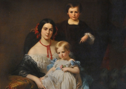 Charlotte Fould (1826-1917), marquise de Breteuil, avec deux de ses enfants, dont Henri (1848-1916)